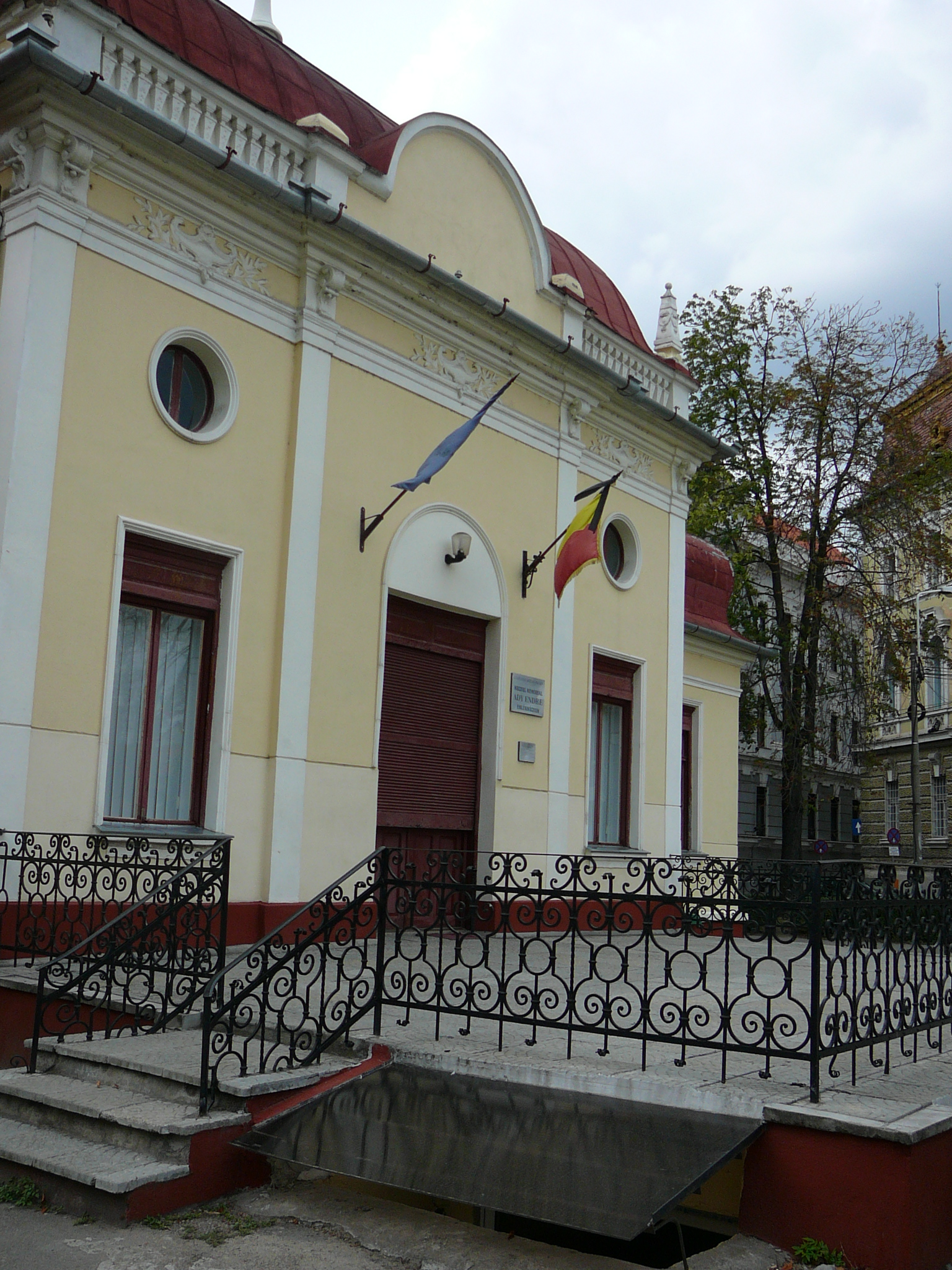 Ady Endre Múzeum épülete Nagyváradon